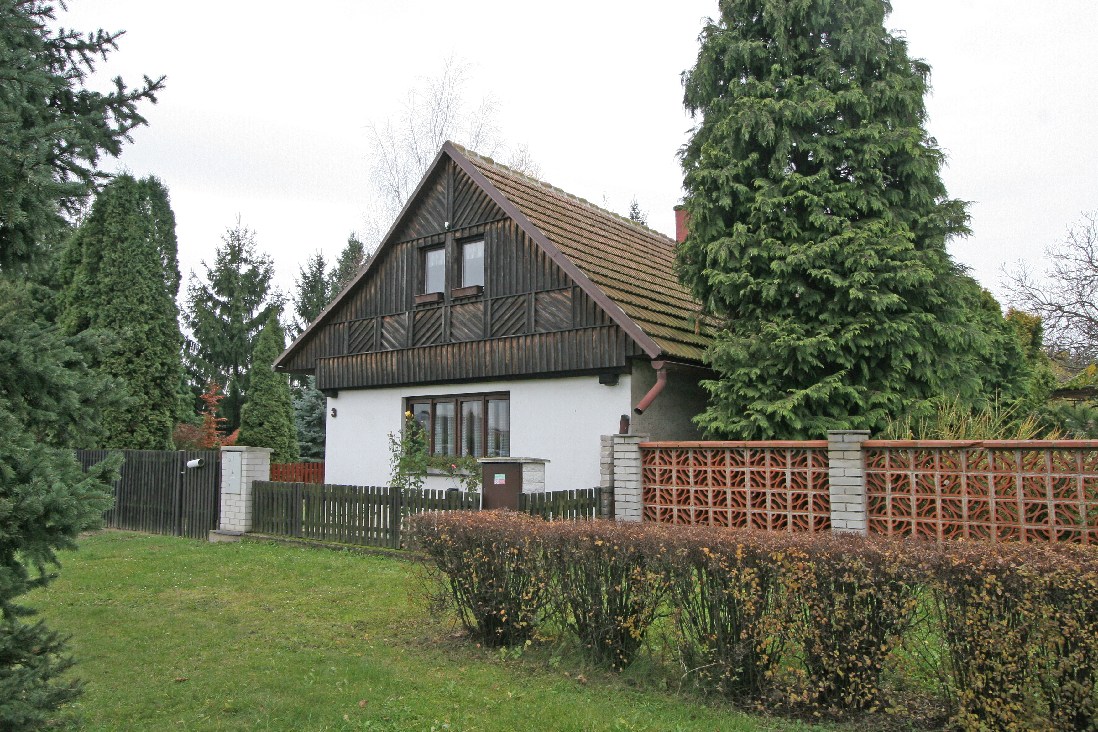 Venkovský dům (Borek), náves 3, Borek